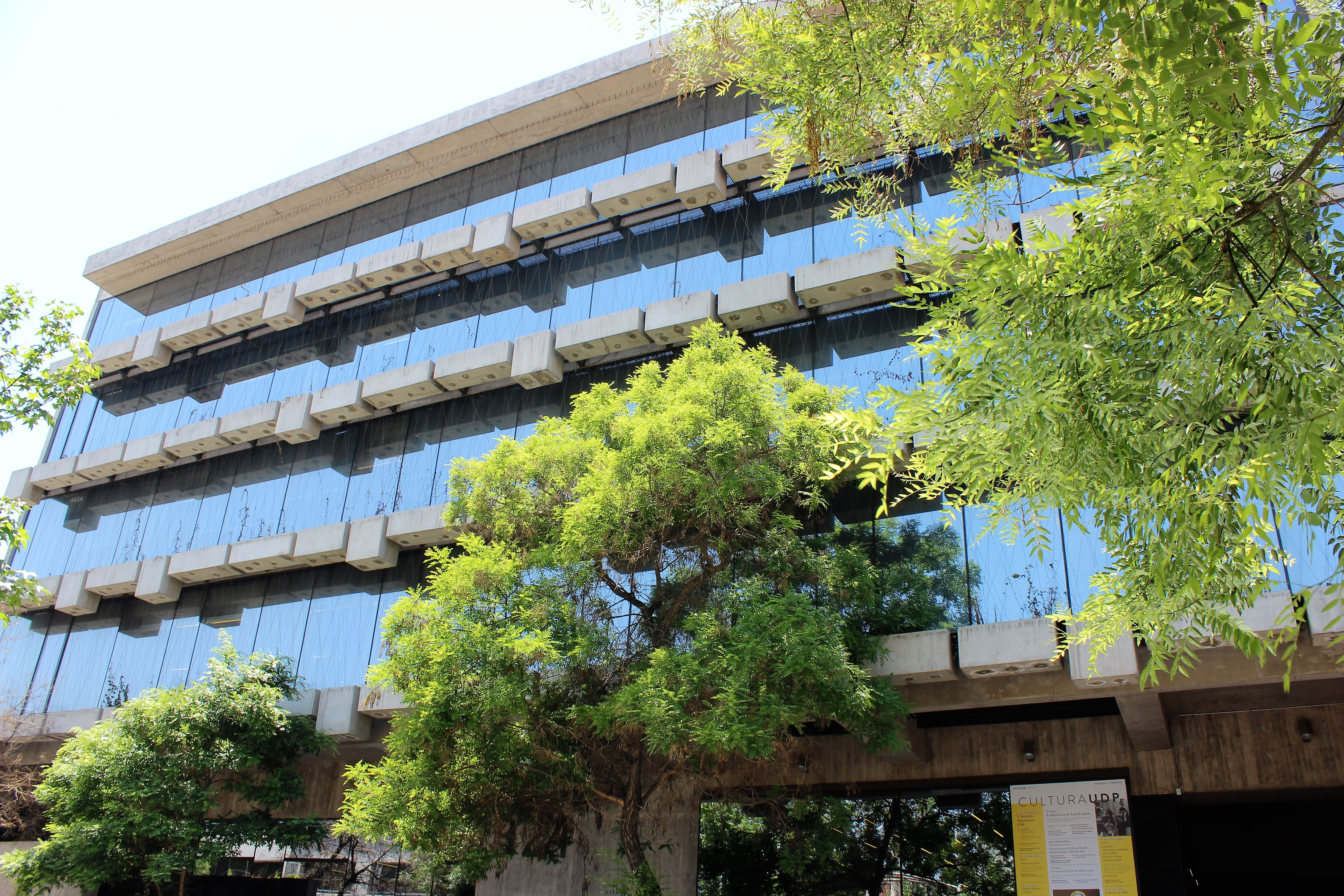 Exterior de la Biblioteca Nicanor Parra (UDP), ubicada en el barrio República, calle Vergara 324, obra de Mathias Klotz (arquitectos colaboradores: Francisco Reyes, Pedro Pedraza, Eduardo Ruiz-Risueño, María José Celis).